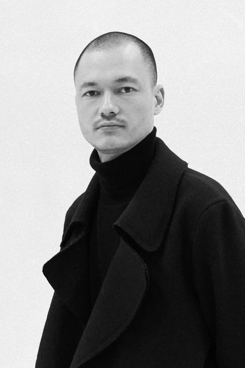 Filmproduzent Markus Weicker (2019)